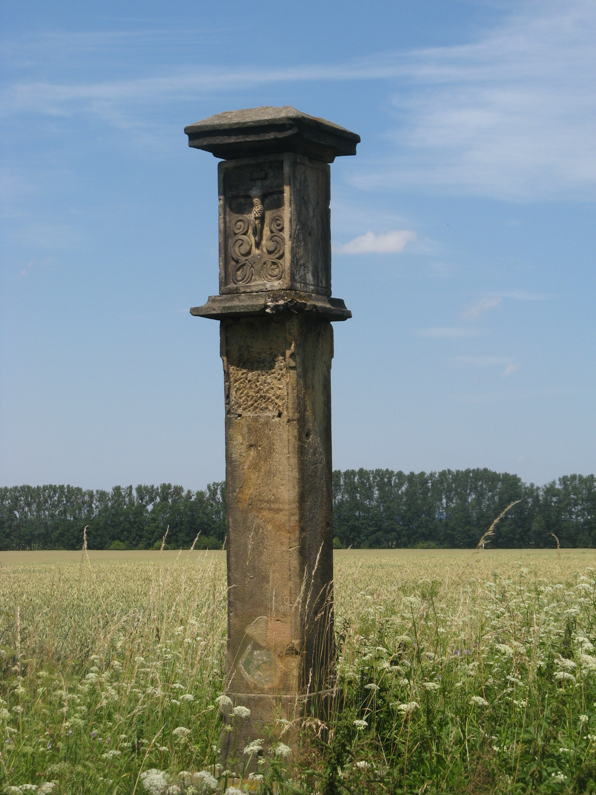 Boží muka (1698), Koclířov (okres Svitavy), stojí u silnice z Koclířova do Svitav v zatáčce na hranici katastru